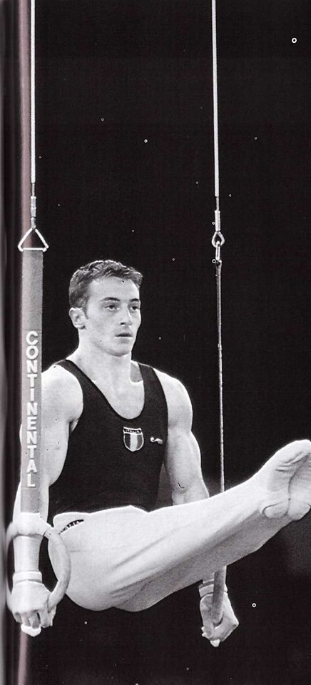 Jury Chechi agli anelli. Giochi Olimpici di Atlanta (1996). Autore della foto sconosciuto.